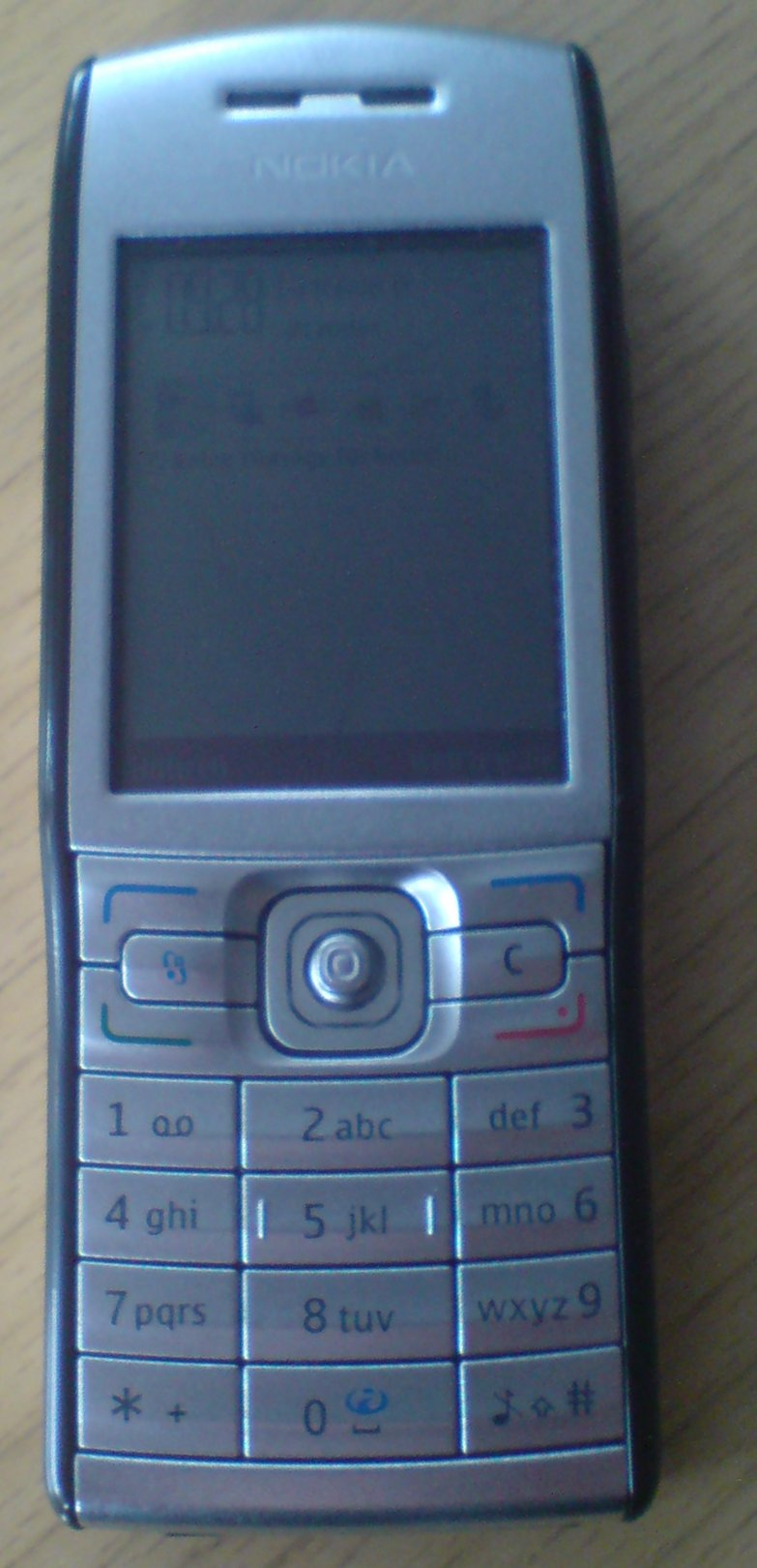 Nokia E50